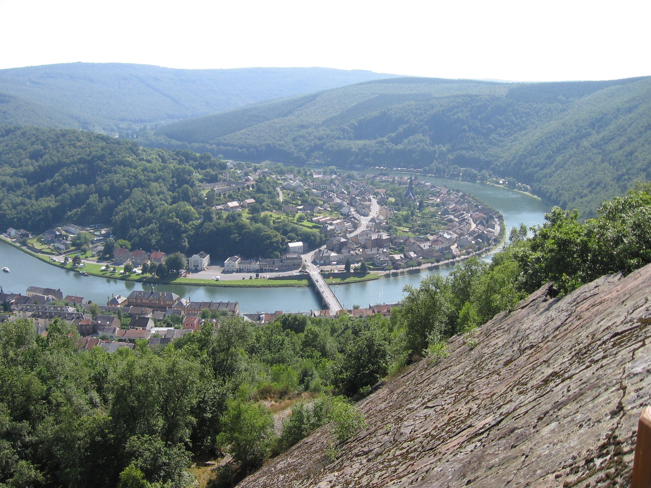 La boucle de la Meuse à Monthermé dans les Ardennes françaises (Parc naturel régional des Ardennes)